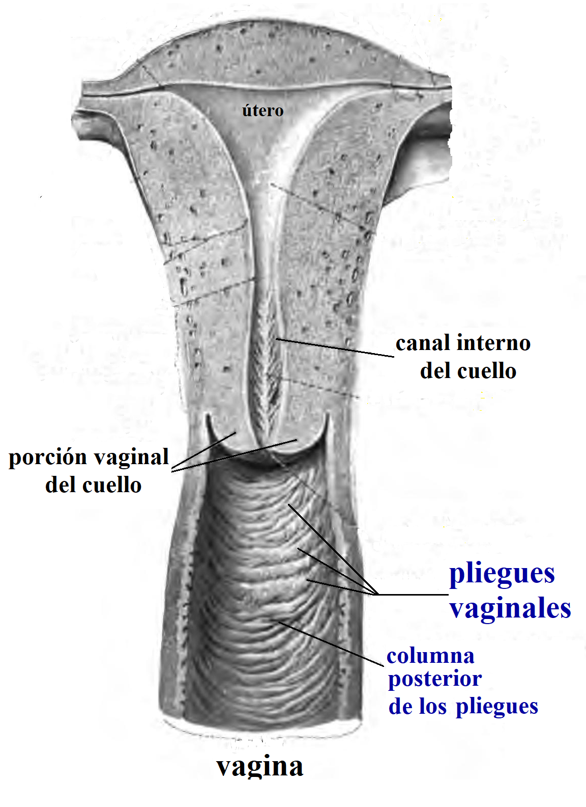 Pliegues vaginales. Corte sagitsl de vagina y útero.